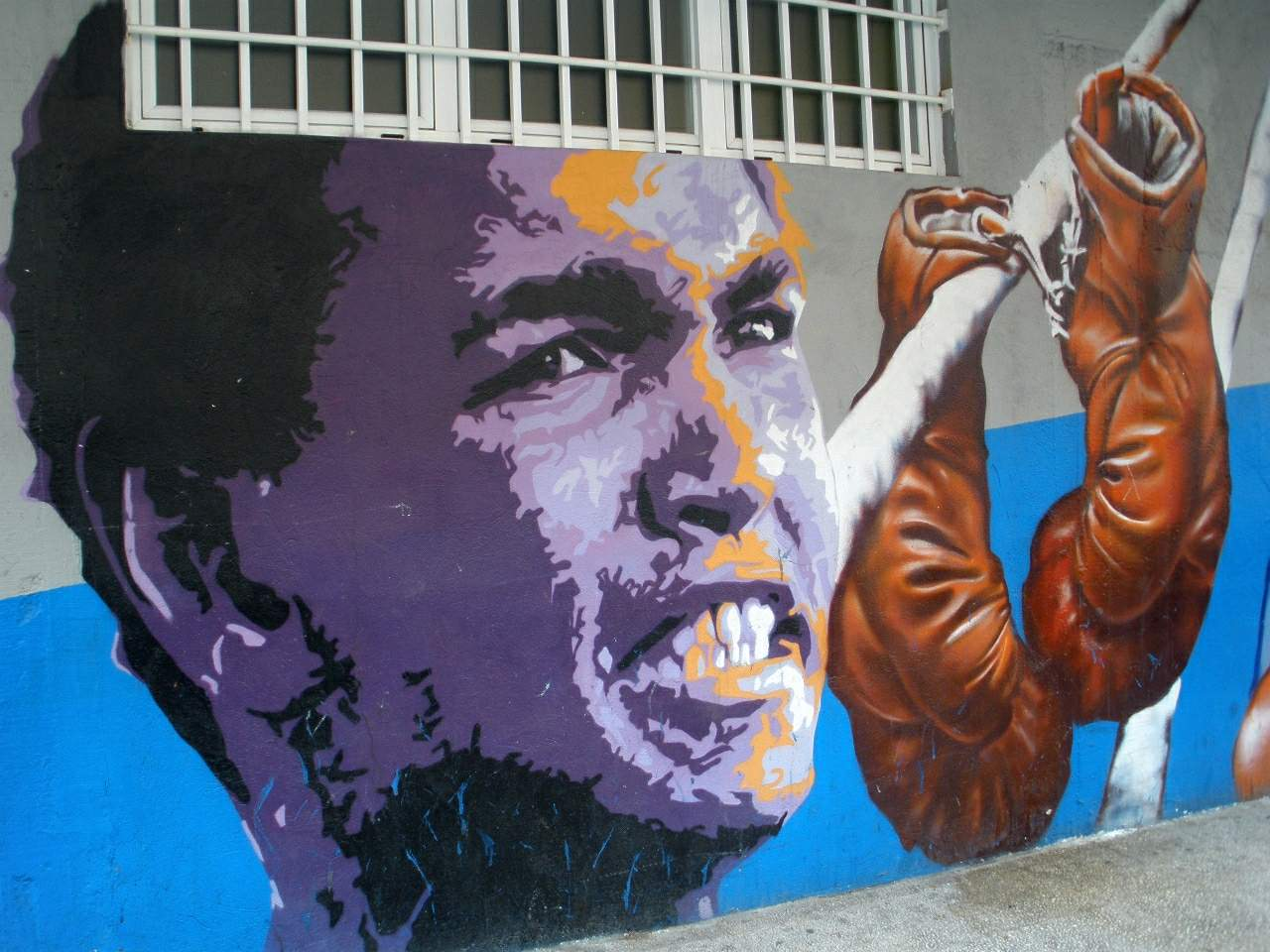 Graffiti in Vitoria-Gasteiz